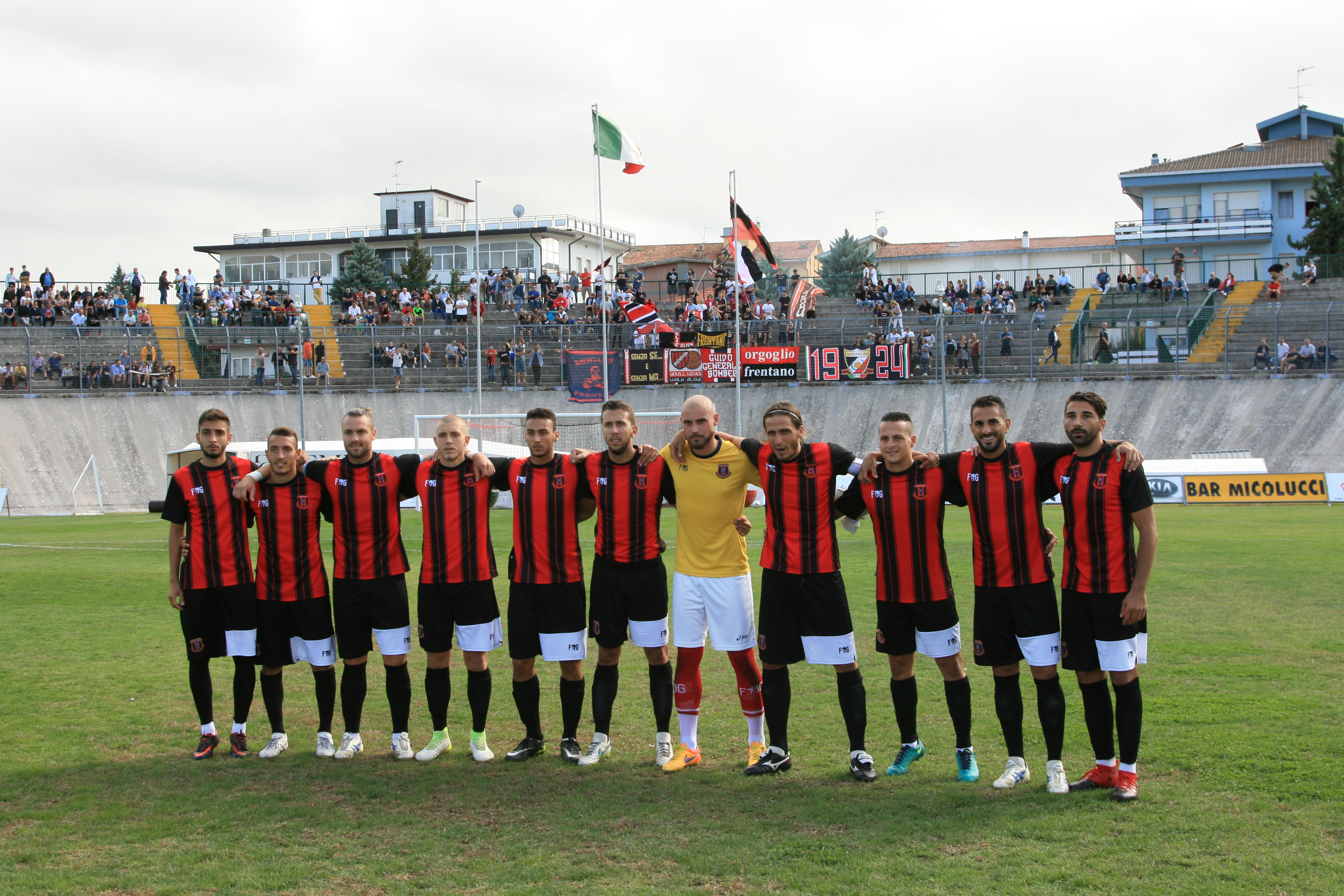 La formazione del Lanciano Calcio 1920 nello stadio Guido Biondi di Lanciano